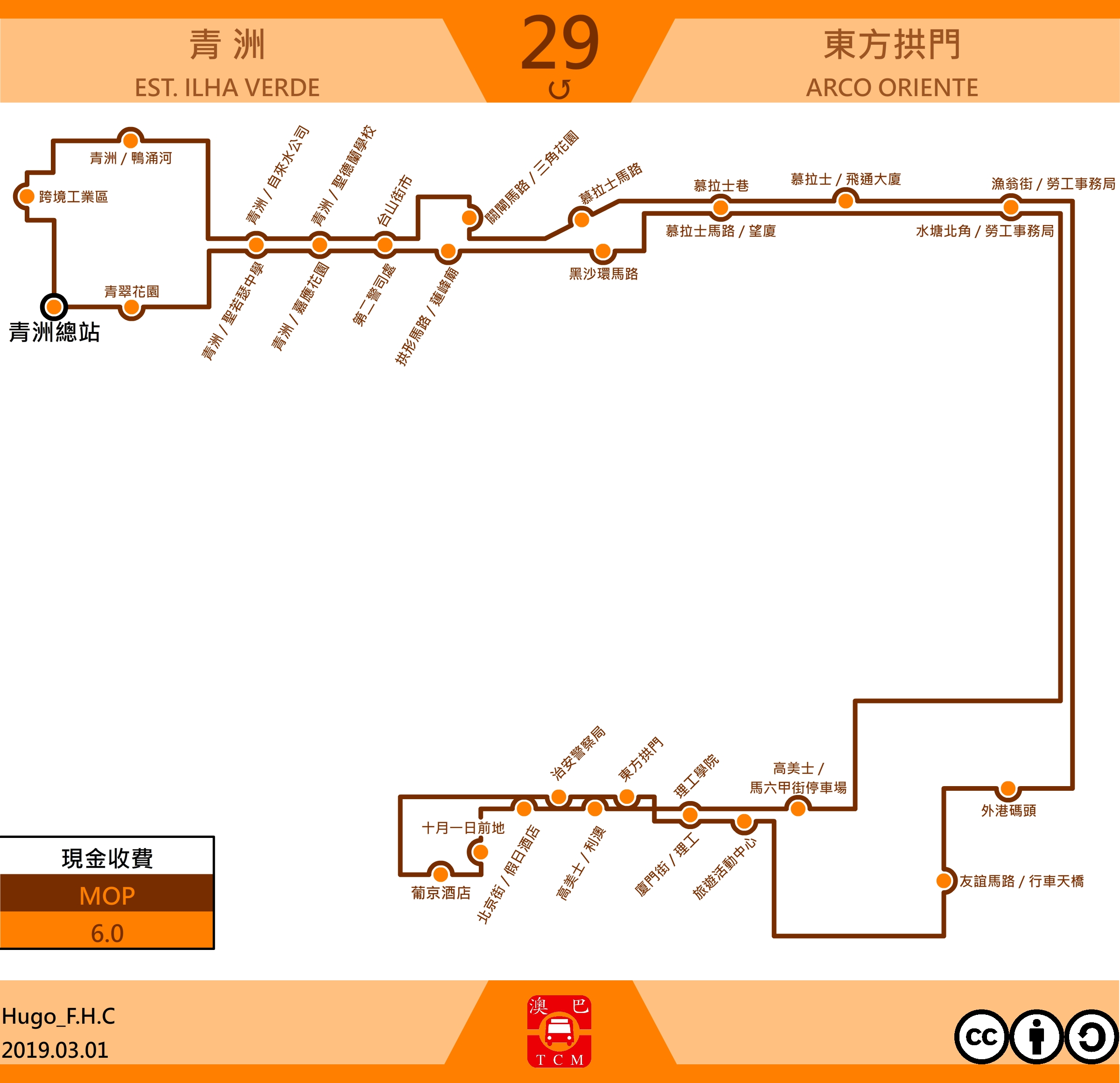 澳門巴士29走線圖